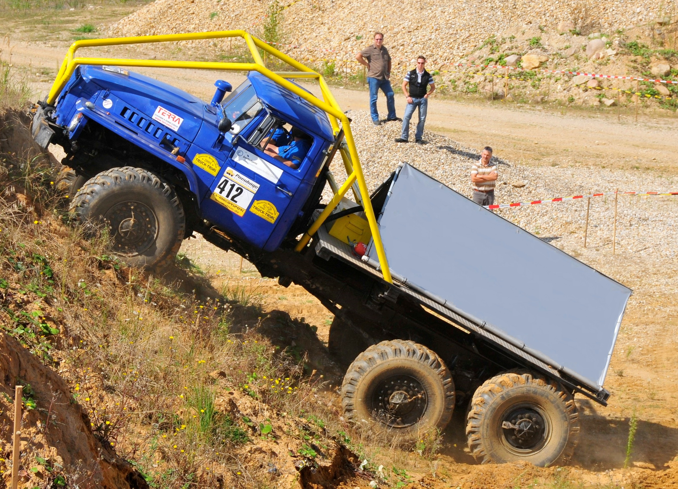 Ural-4320 beim Einsatz im Truck Trail